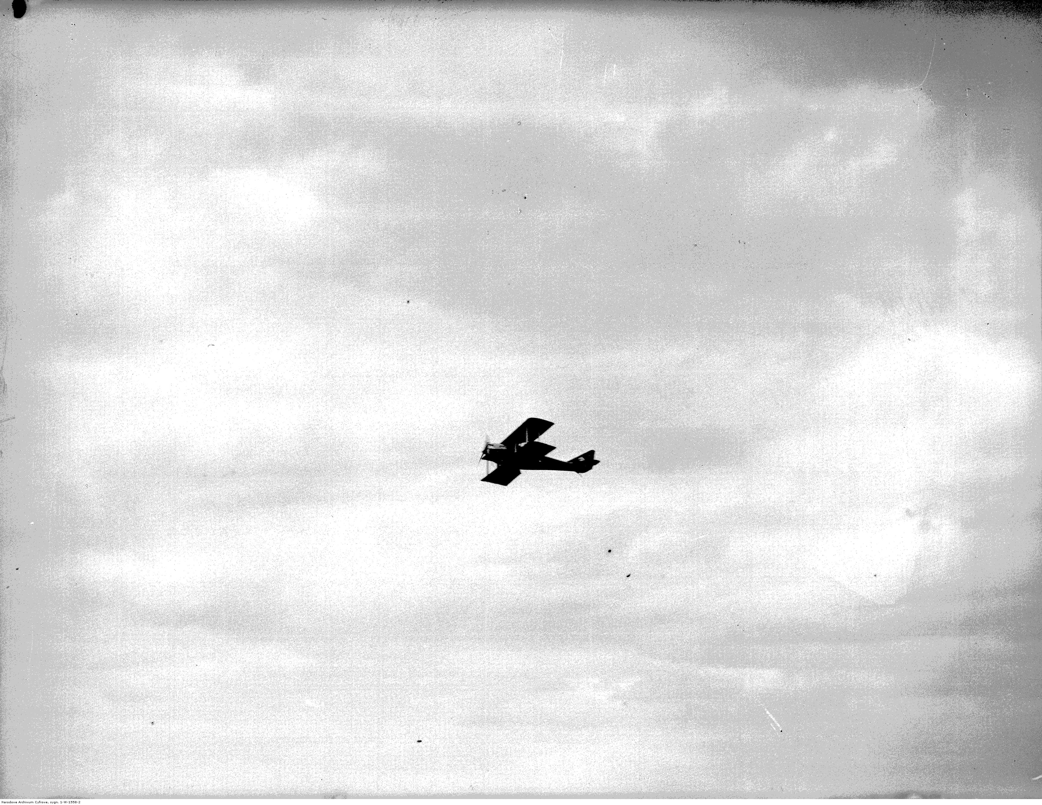 Samolot Ansaldo A-300-4 SP-ABO w locie.